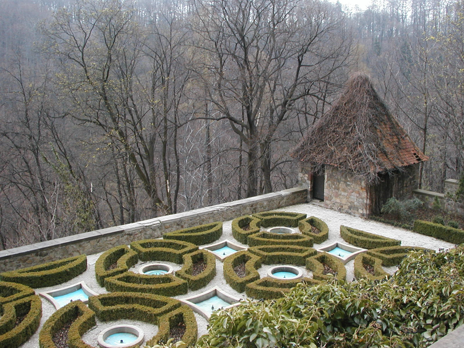 Wasserterrasse im Schlosspark von Książ/Fürstenstein